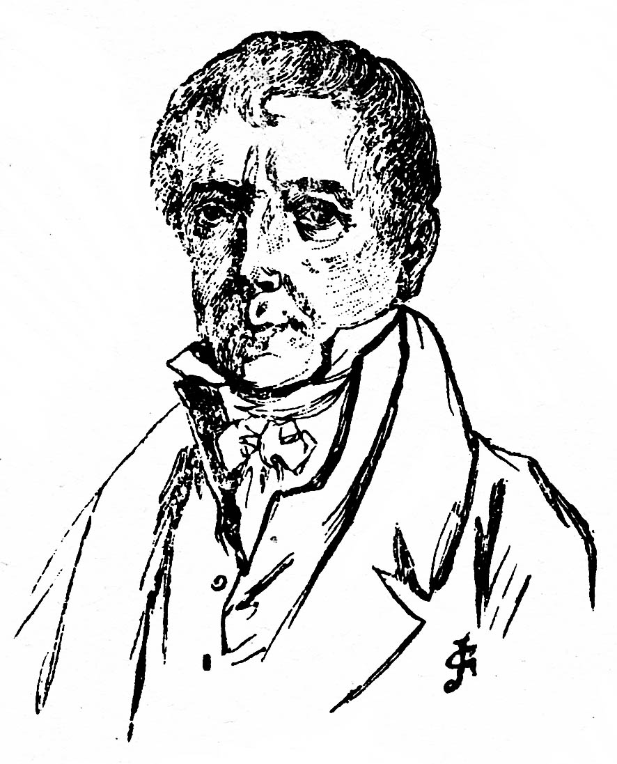 Ramond, par Charles Jouas. Vignette de couverture, tome I de "Cent Ans aux Pyrénées", de Henri Beraldi.